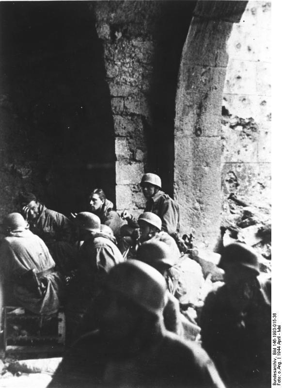 Unter den Trümmern von Cassino. Deutsche Fallschirmjäger kämpfen tapfer weiter